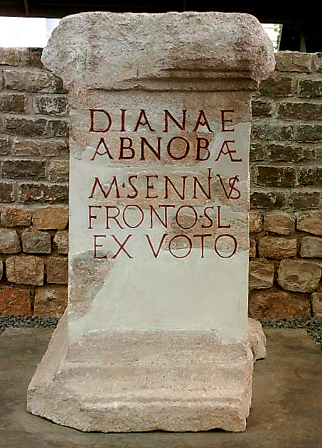 Altar der Diana Abnoba, Badenweiler.